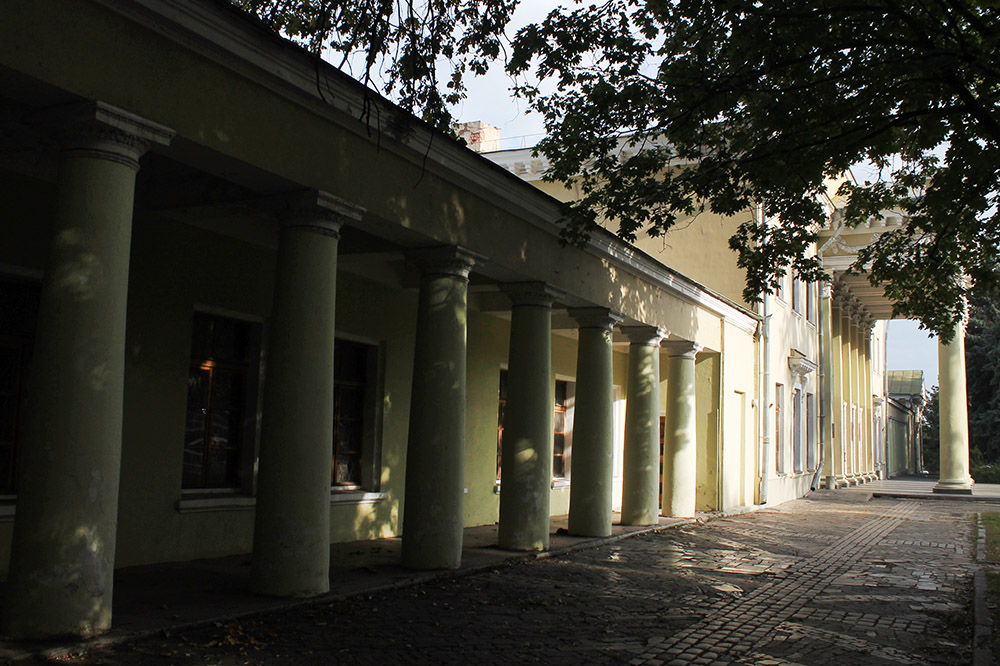 Колонада Потьомкінського палацу у Дніпрі.